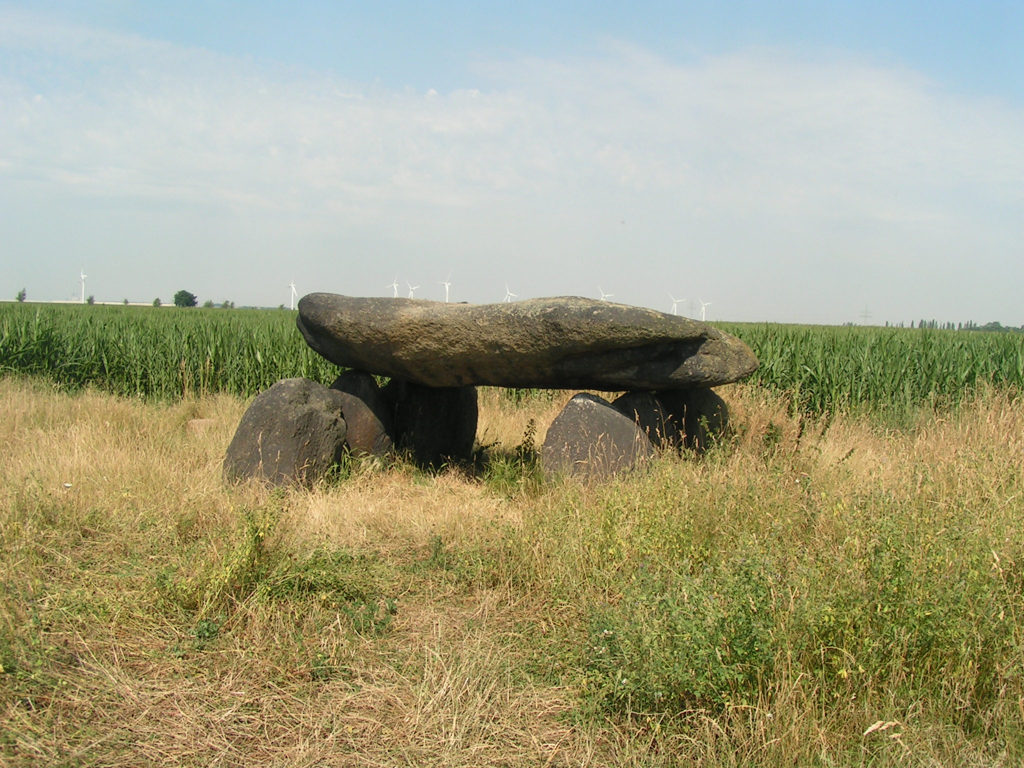 Hünengrab bei Drosa